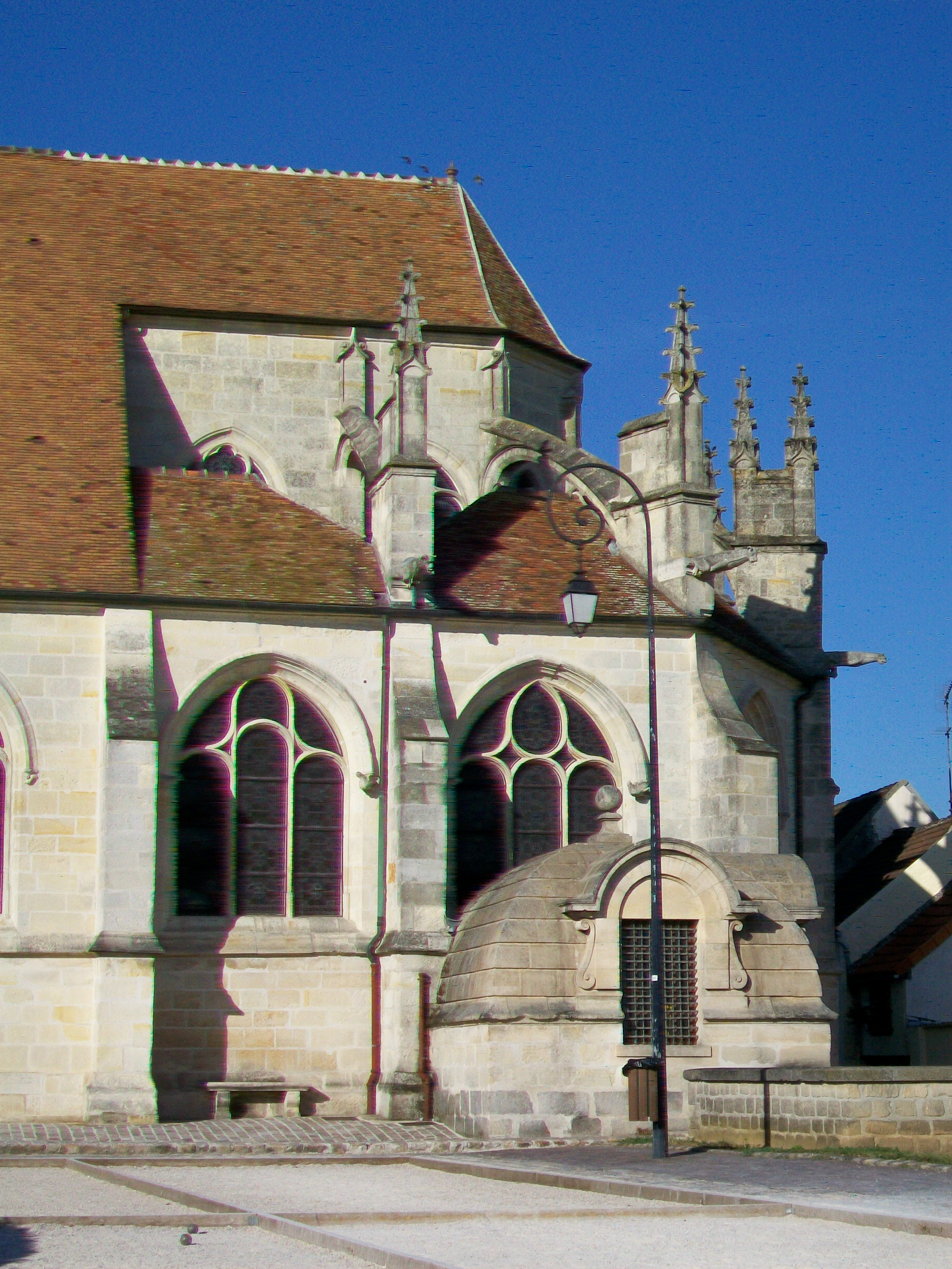 Le chœur, vue depuis le sud-ouest.